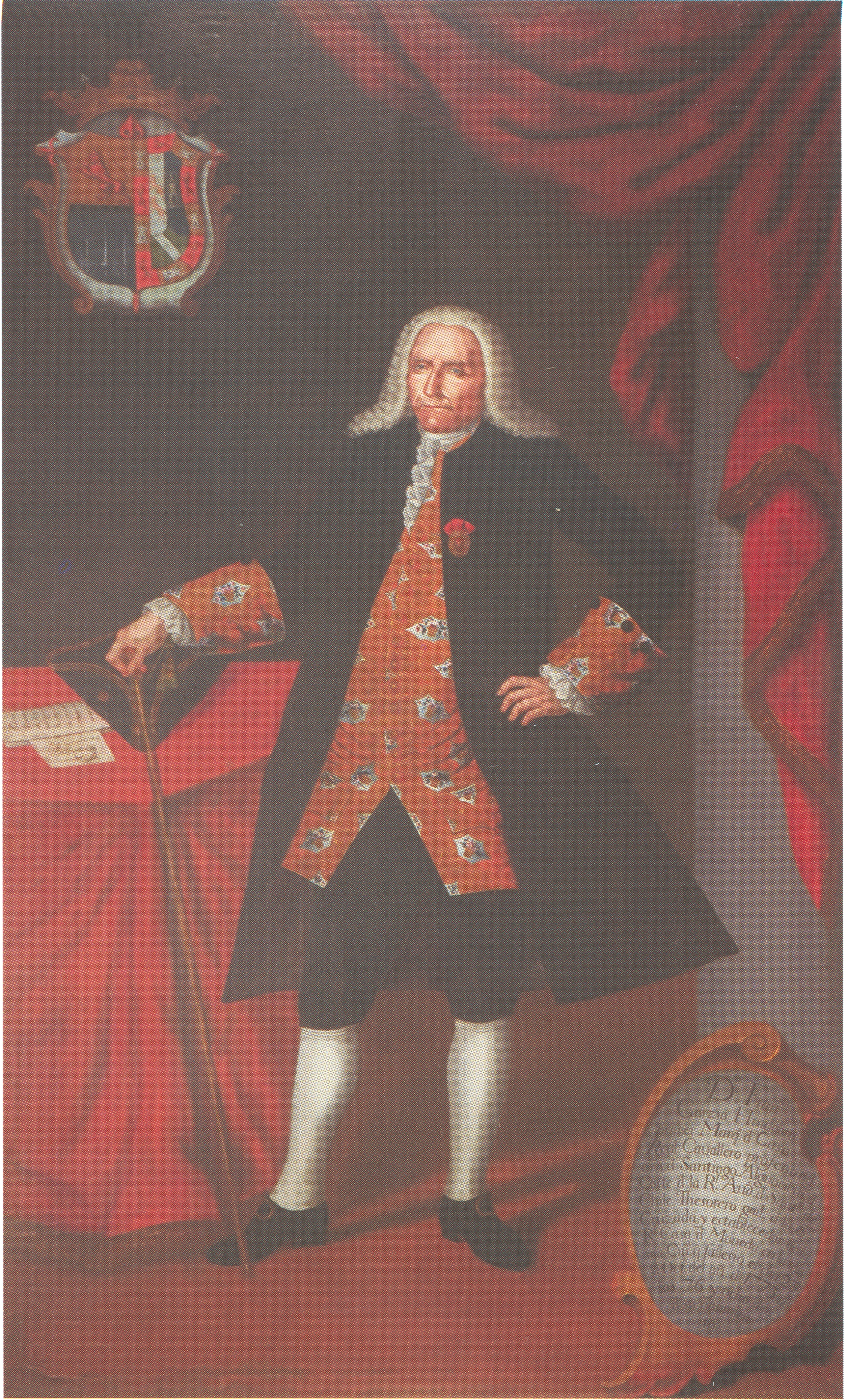 Colección del Museo Histórico Nacional de Chile (2009). La Pintura como Memoria Histórica. Dirección de Bibliotecas, Archivos y Museos de Chile, Santiago de Chile Año 2009. Imagen consultada en el Fondo de Bibliografía Digital del Archivo Histórico del Guayas (AHG) Guayaquil, Ecuador.